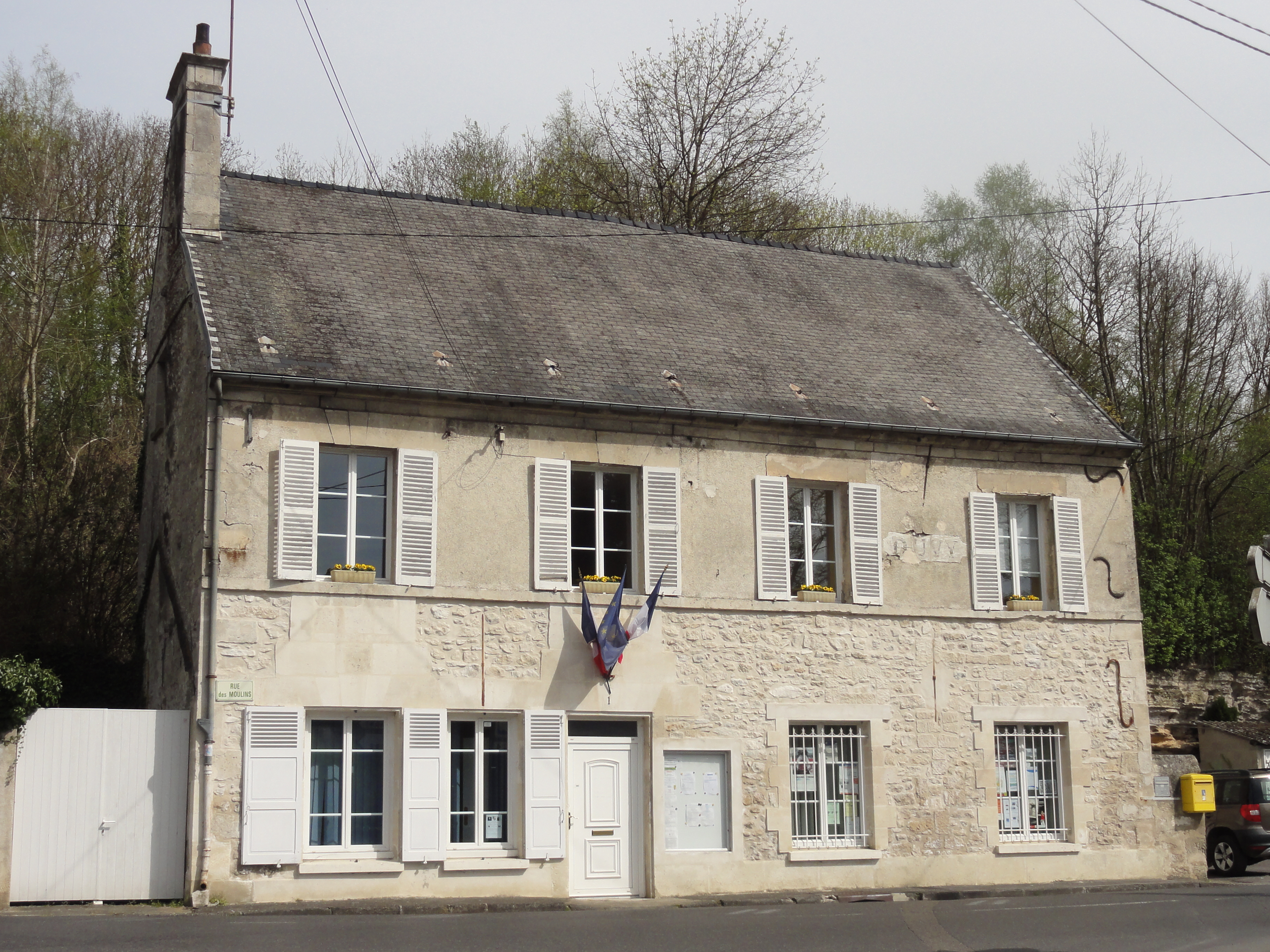 Village de Duvy (voir titre).